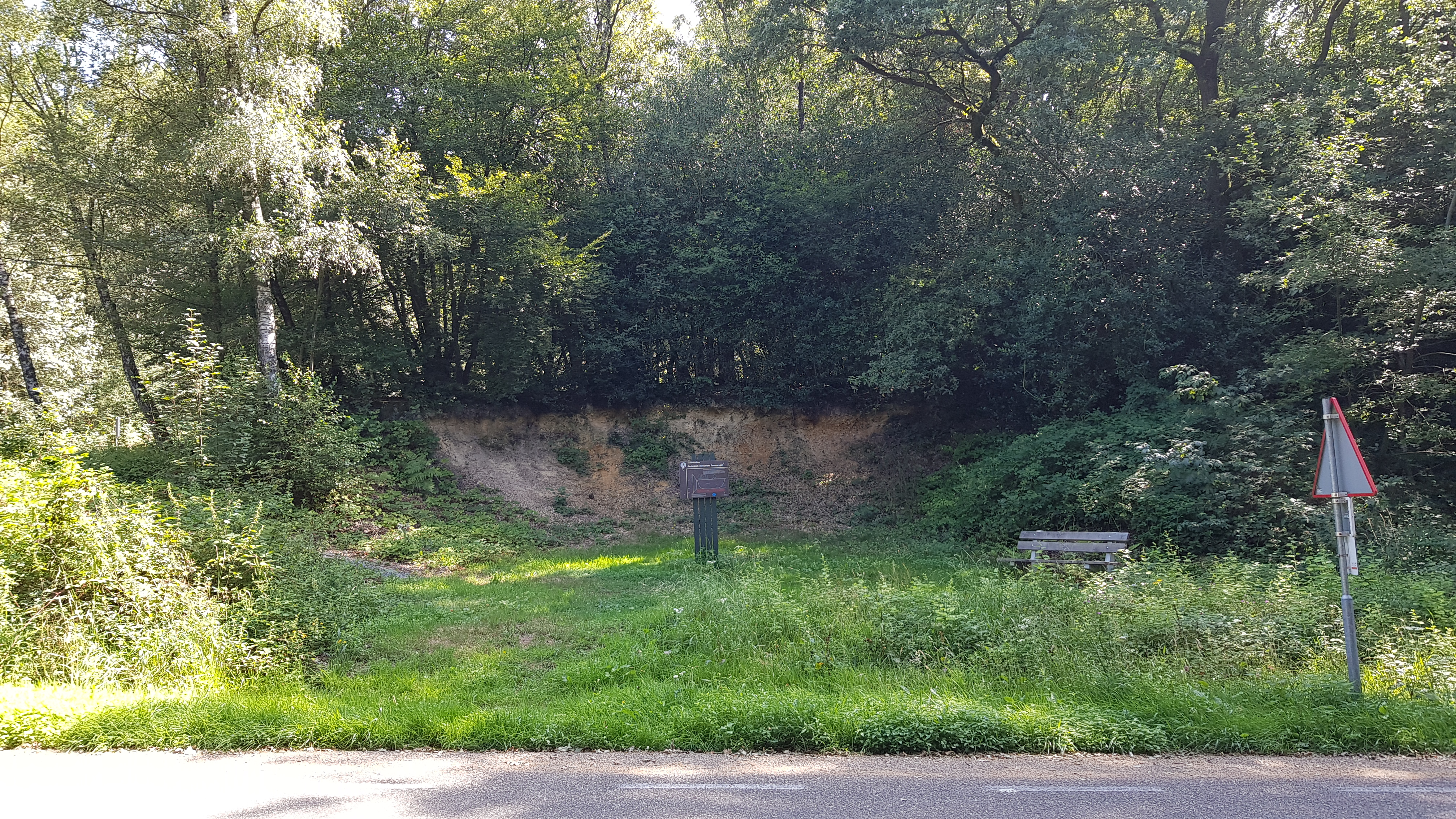 Geologisch monument Zevenwegen, in de Vijlenerbossen, Vaals, Limburg, Nederland